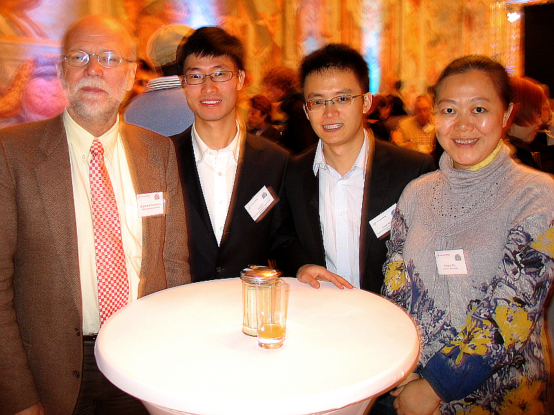 Impressions from the second day of the Herrenhausen Symposium Already Beyond? - 40 Years Limits to Growth, organized by VolkswagenStiftung in the Gallery building of Herrenhausen Gardens in Hanover